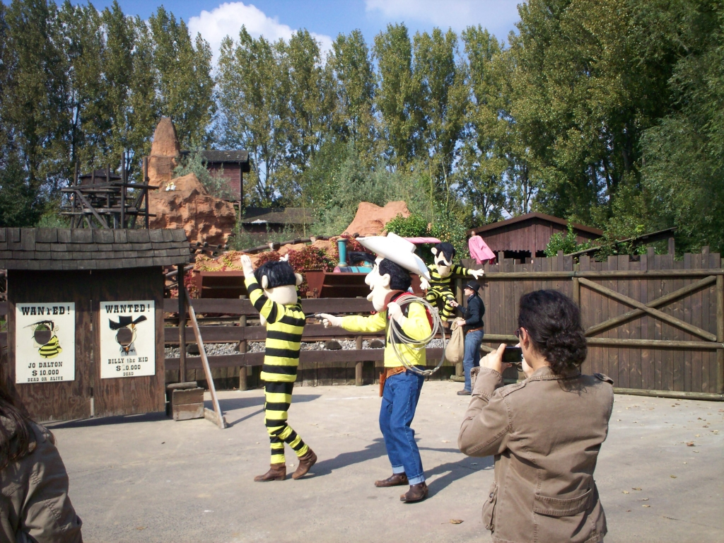 Cowboydorp in Walibi Belgium: Lucky Luke rekent af met de Daltons